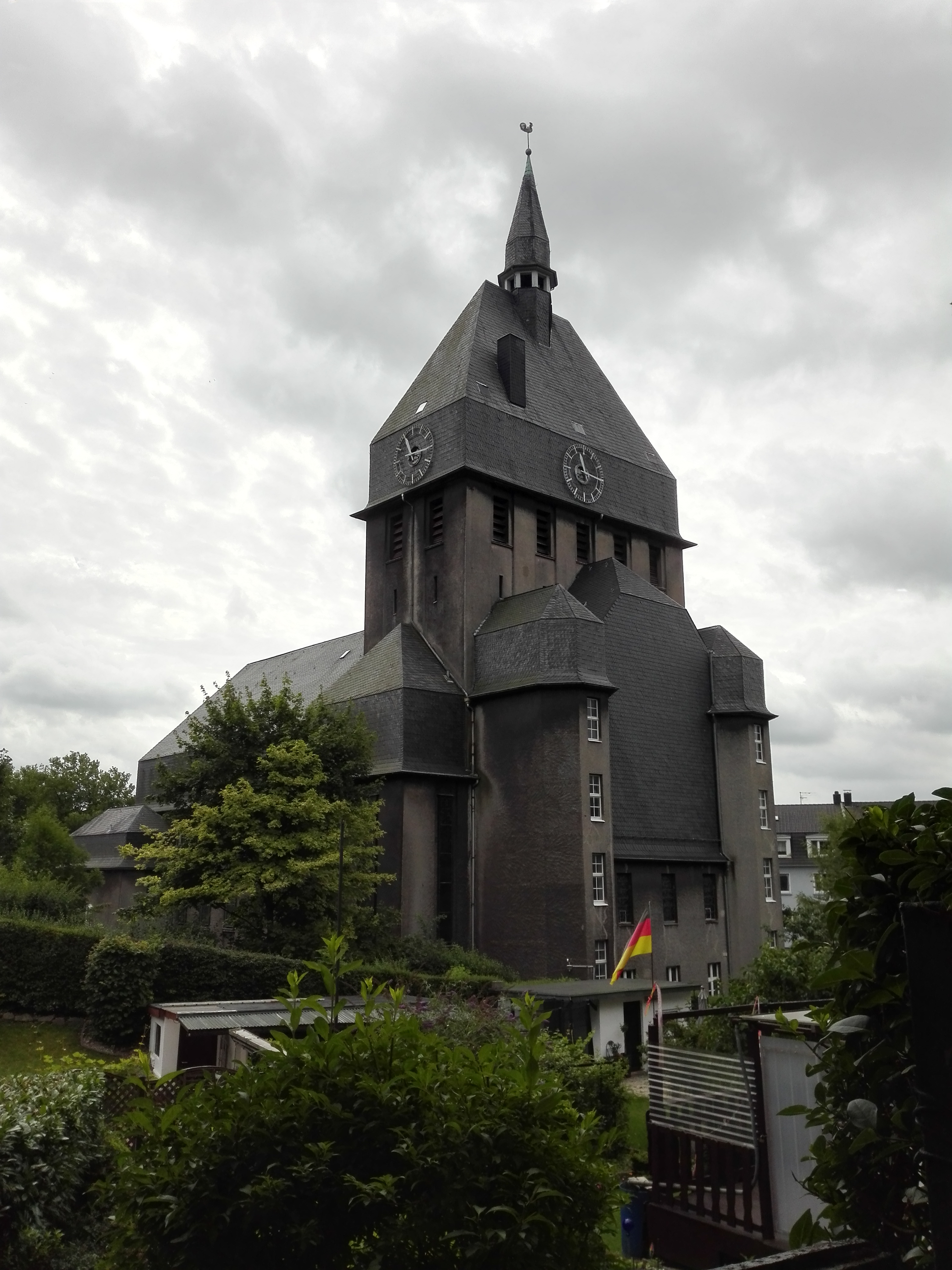 Ansichten der Erlöserkirche in Wuppertal-Wichlinghausen